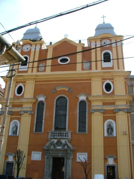 Biserica Piarista din Cluj-Napoca - Piarista templom Kolozsvárott